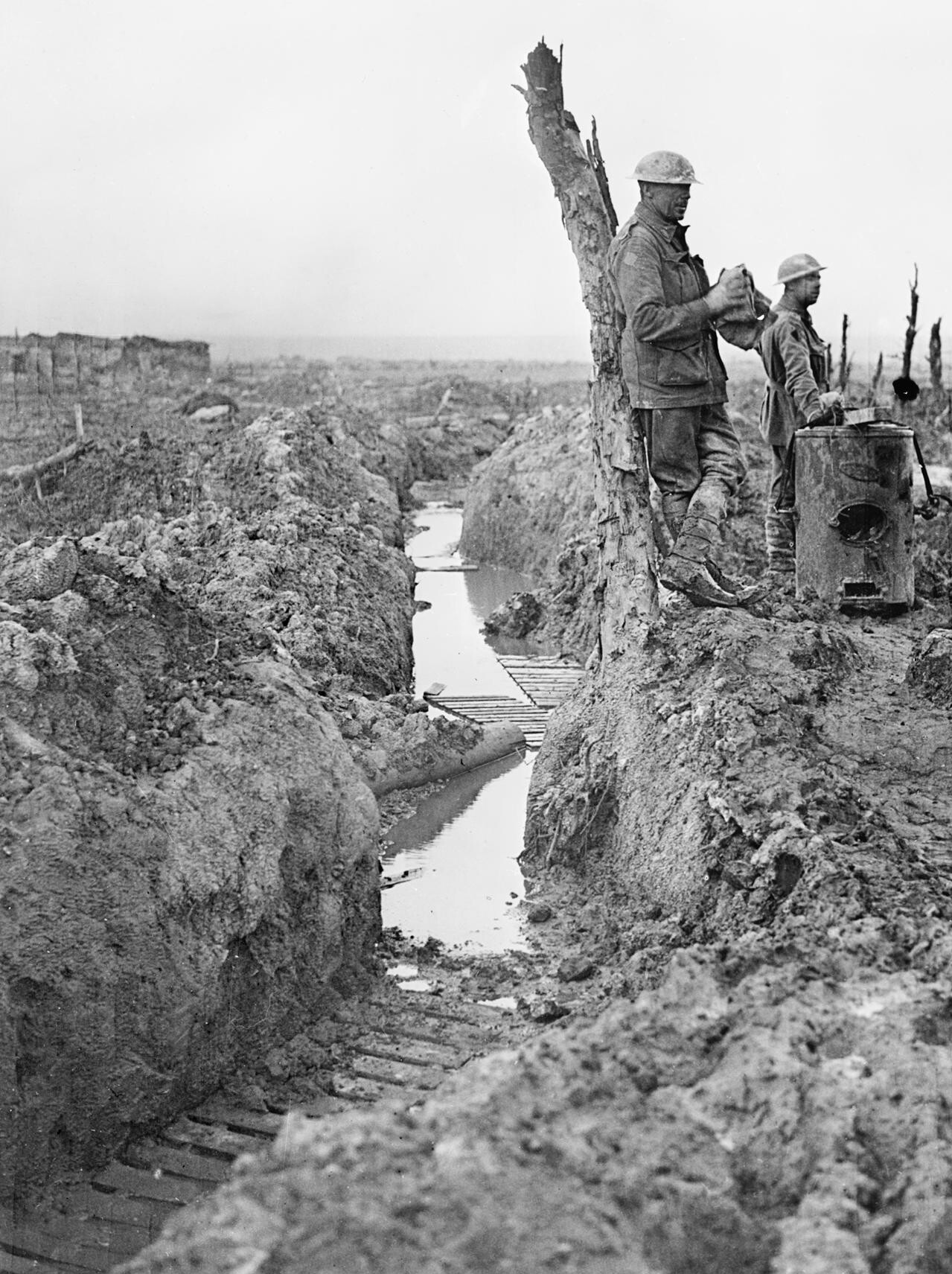 Wassergefüllter Schützengraben bei Passchendaele, 1917